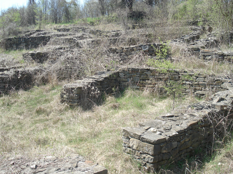 Древната крепост на Калето, край село Дебнево, България